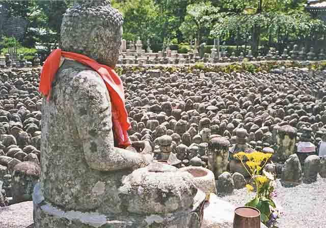 Adashino Nenbutsu-ji, Kyoto, Japan